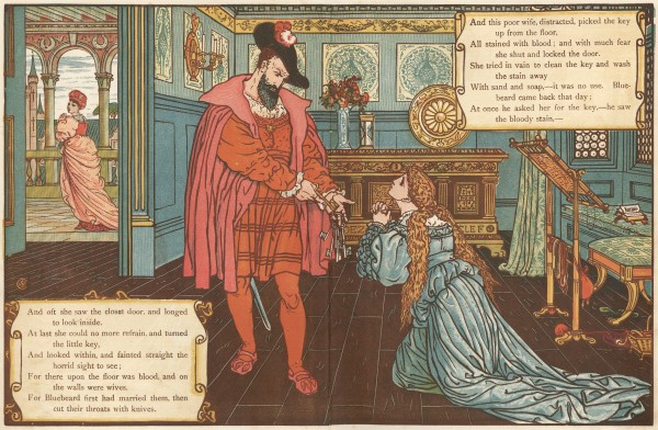 Гравюры по рисункам Крейна к сказкам «Синяя Борода», «Спящая Красавица», «Красная Шапочка», «Джек и бобовый стебель»